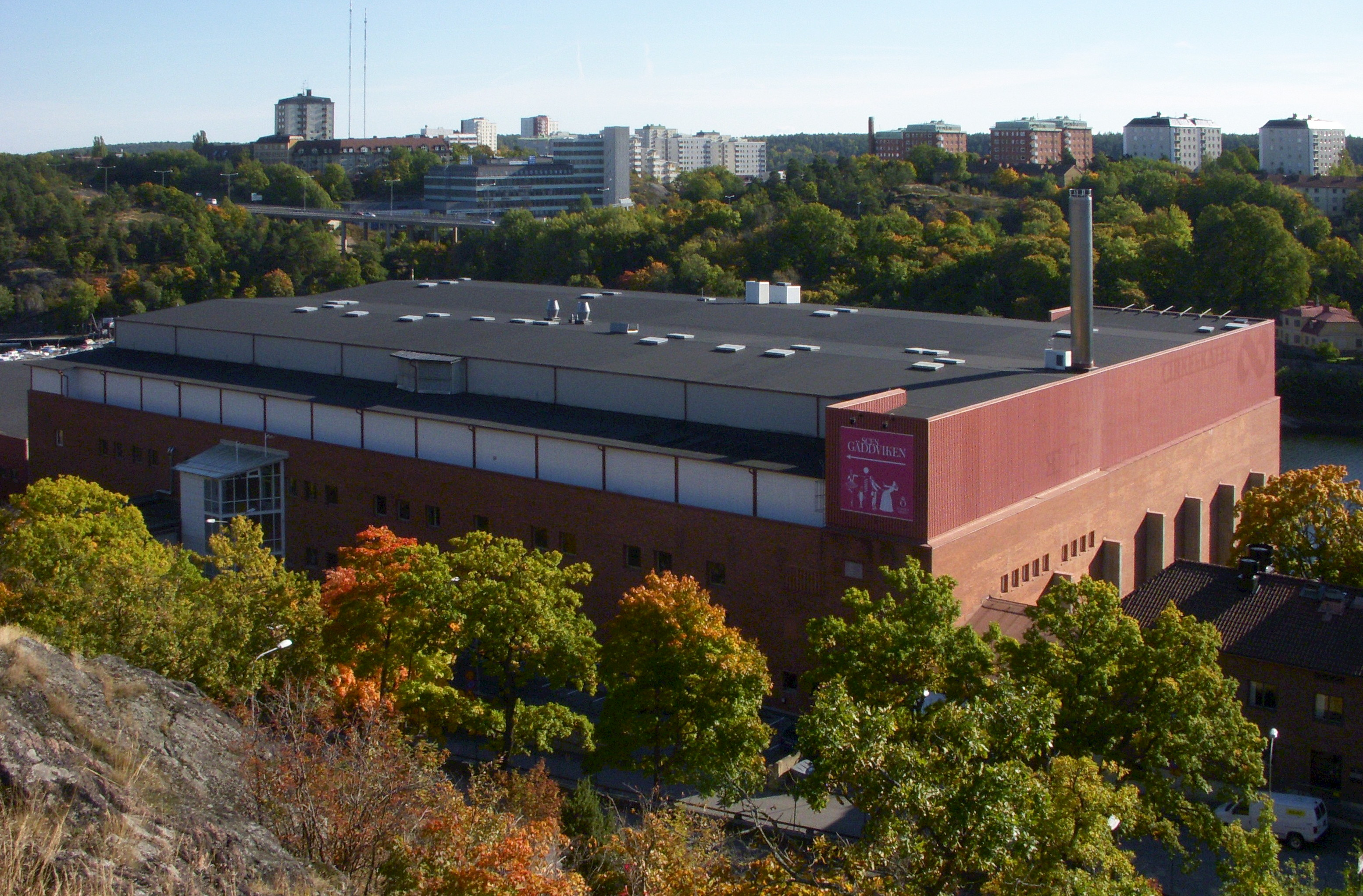 KF:s kafferosteri i Gäddviken, sett från Finnberget